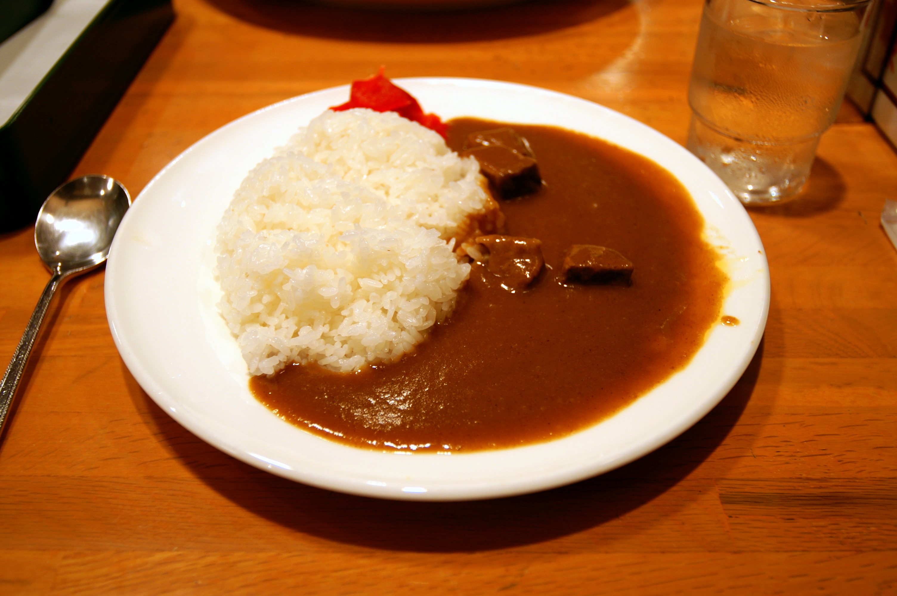 今話題の京都市役所前の地下街で食べたカレー。Yum-Yum!